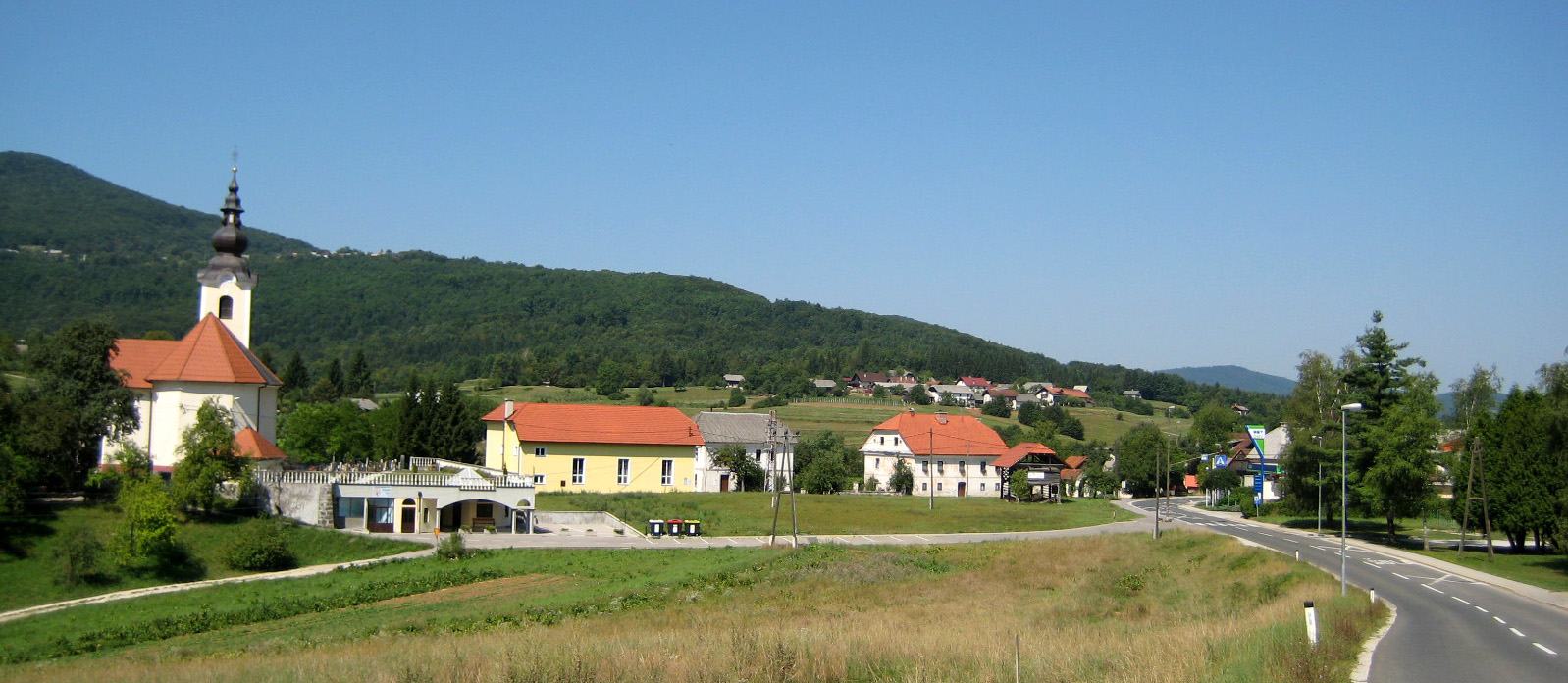 Zagradec, village near river Krka, Slovenia